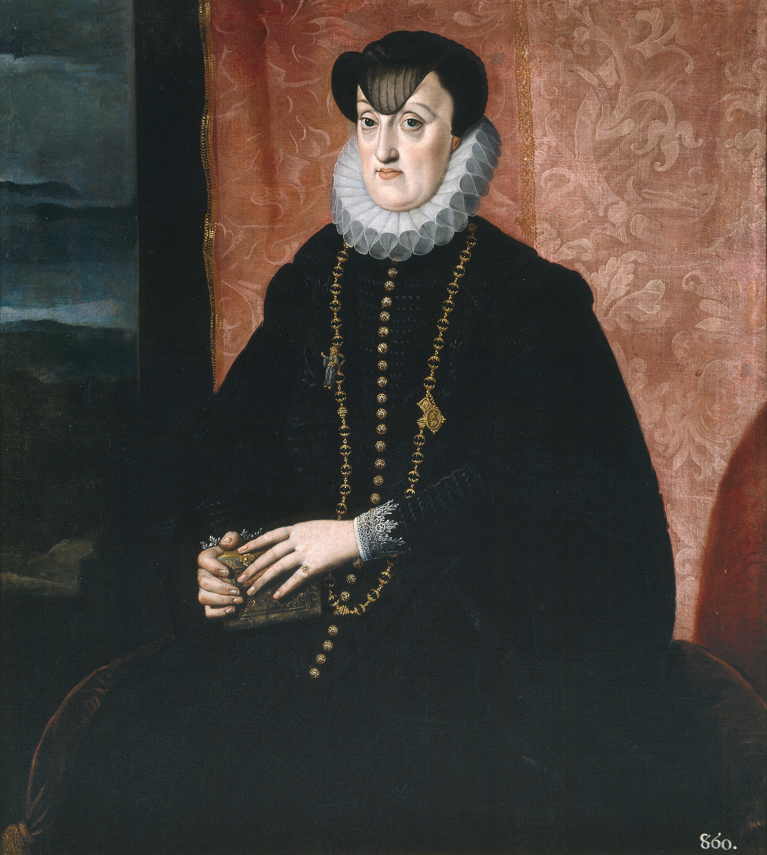 La archiduquesa María de Baviera